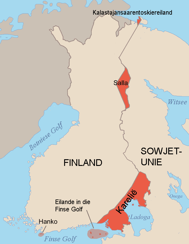 Winteroorlog: Finland se toegewings